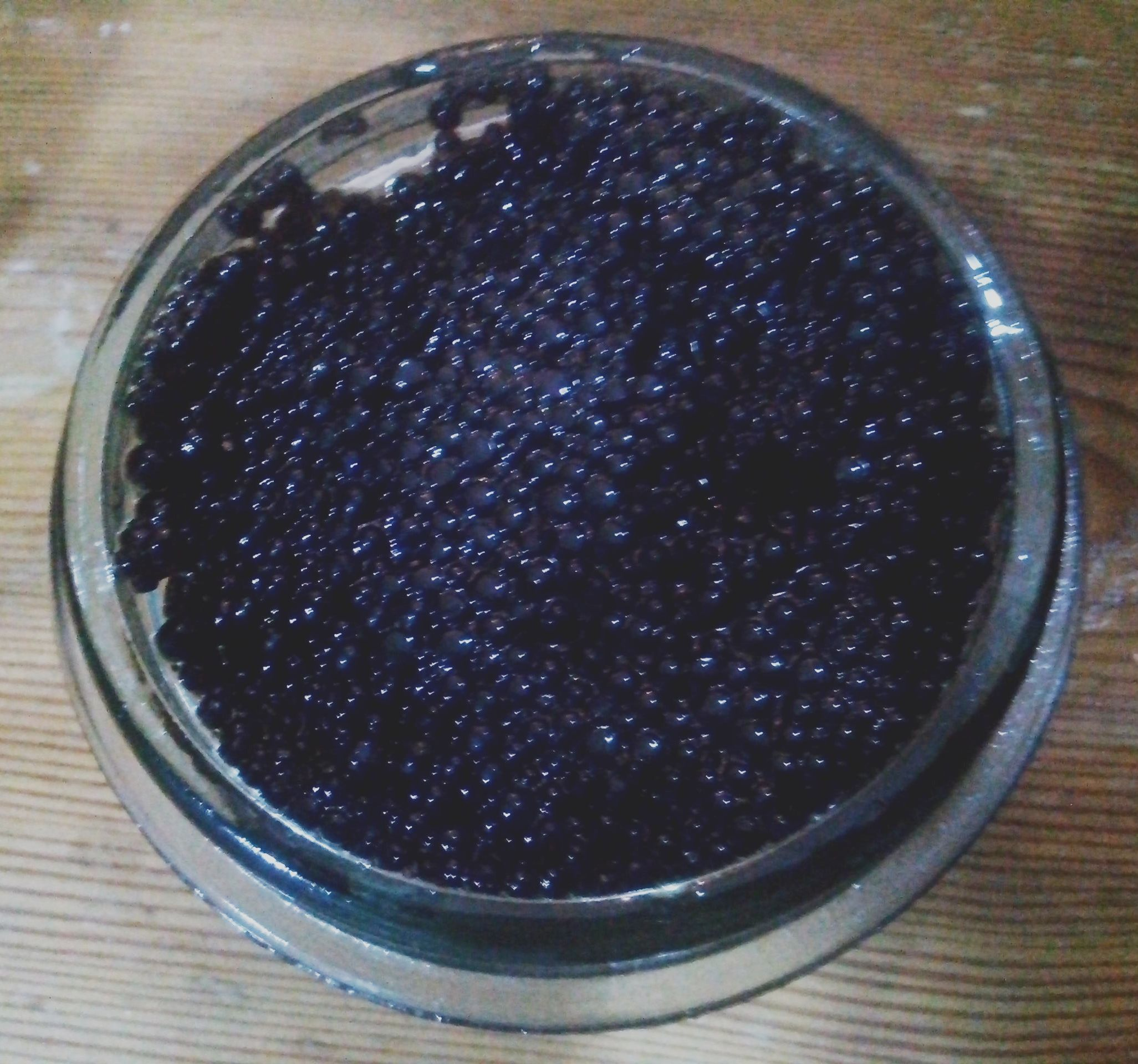 Qara kürü